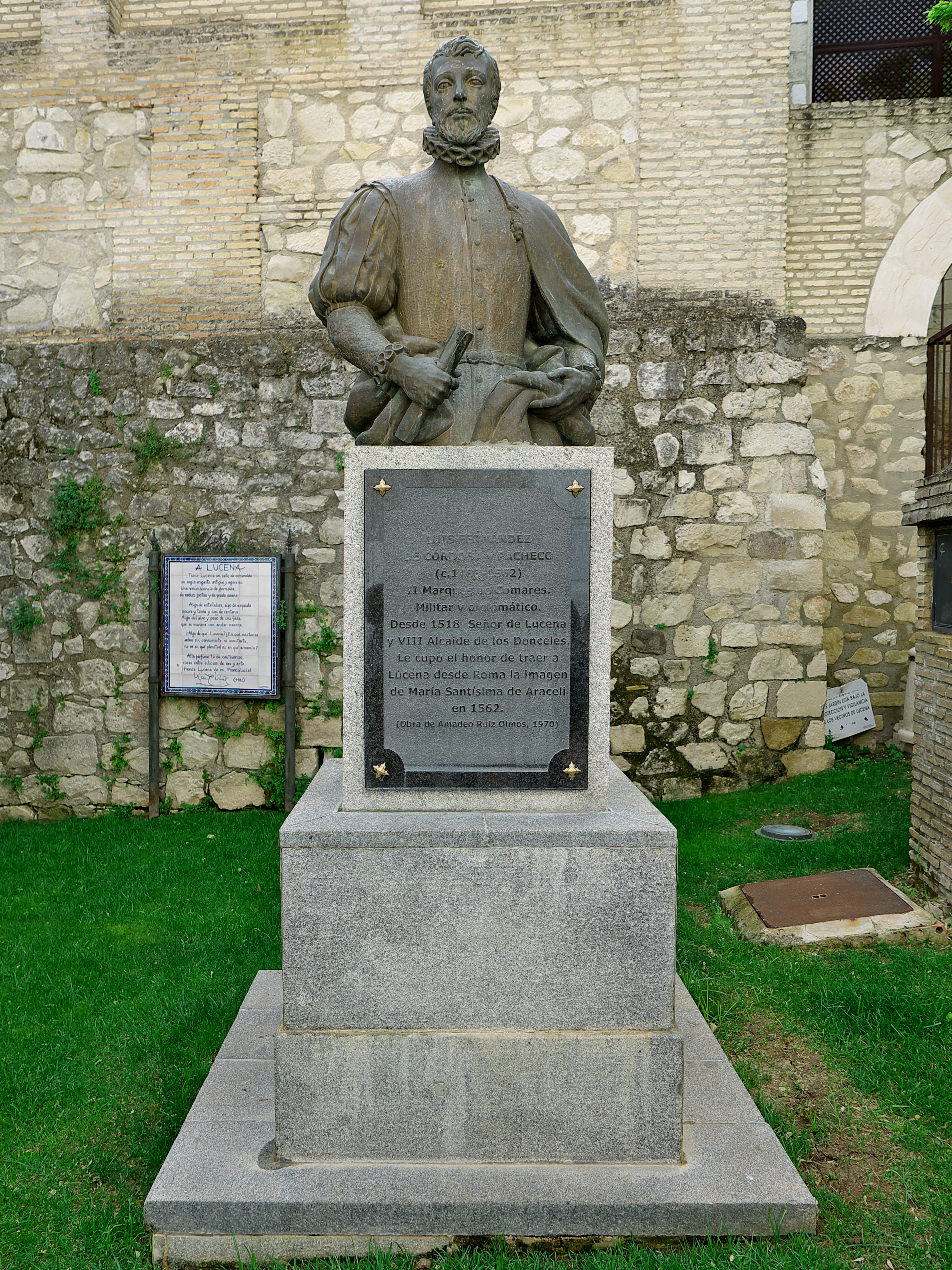 Luis Fernández de Córdoba y Pacheco, Señor de Lucena (1518).